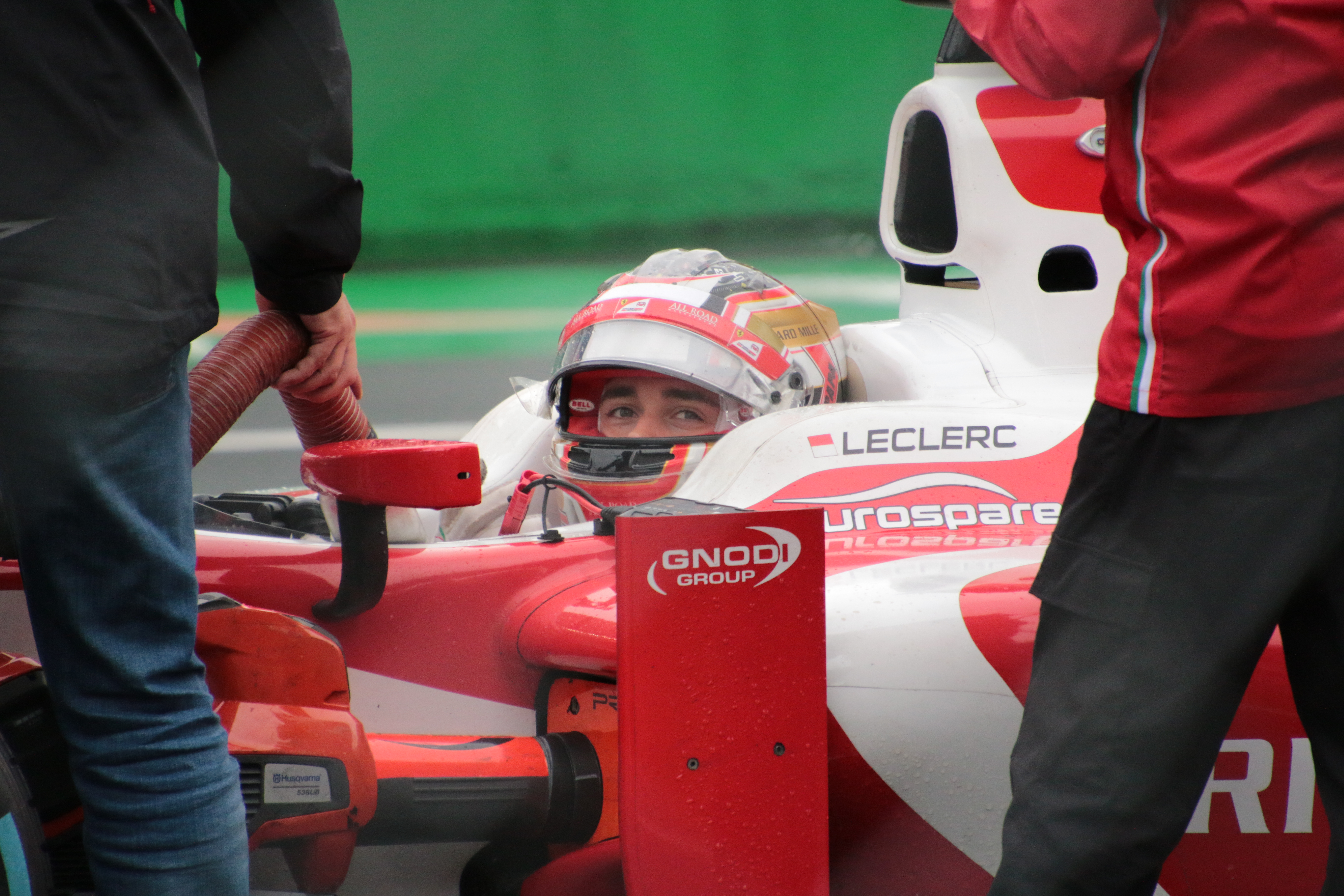 F2:Race1のシャルル１